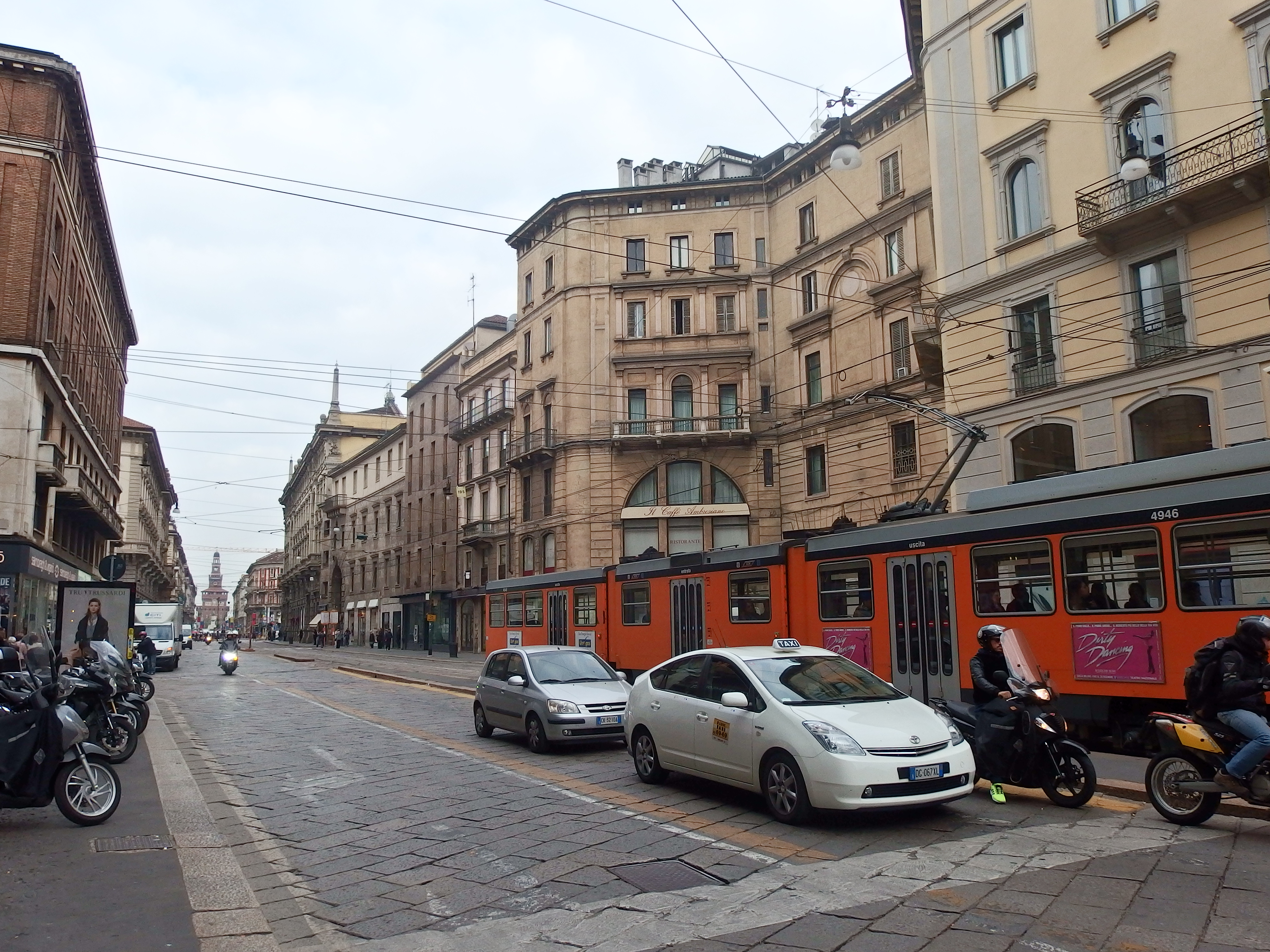 Milano, Via Orefici